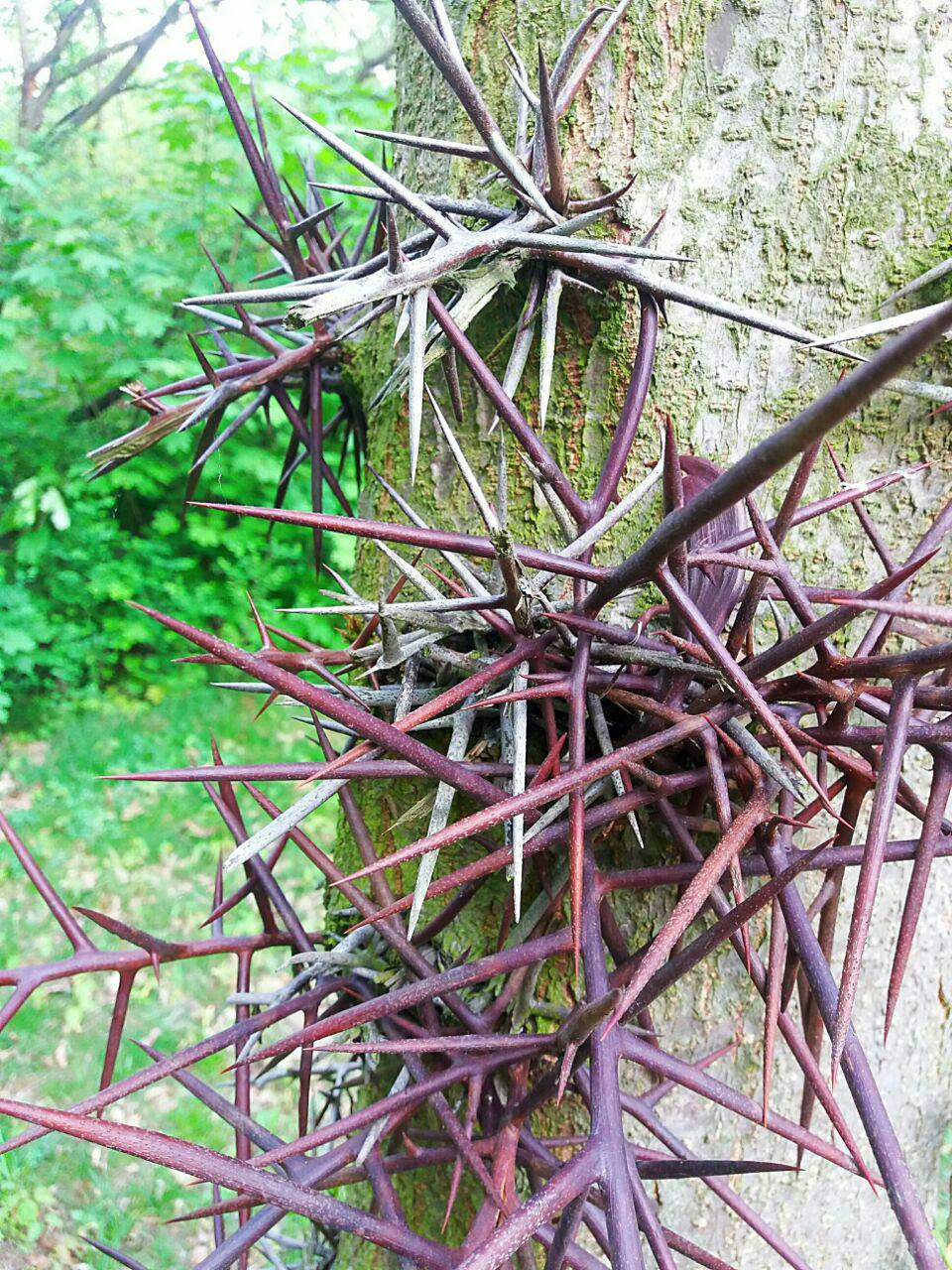 Dornen einer (Amerikanischen oder Chinesischen) Gleditischie